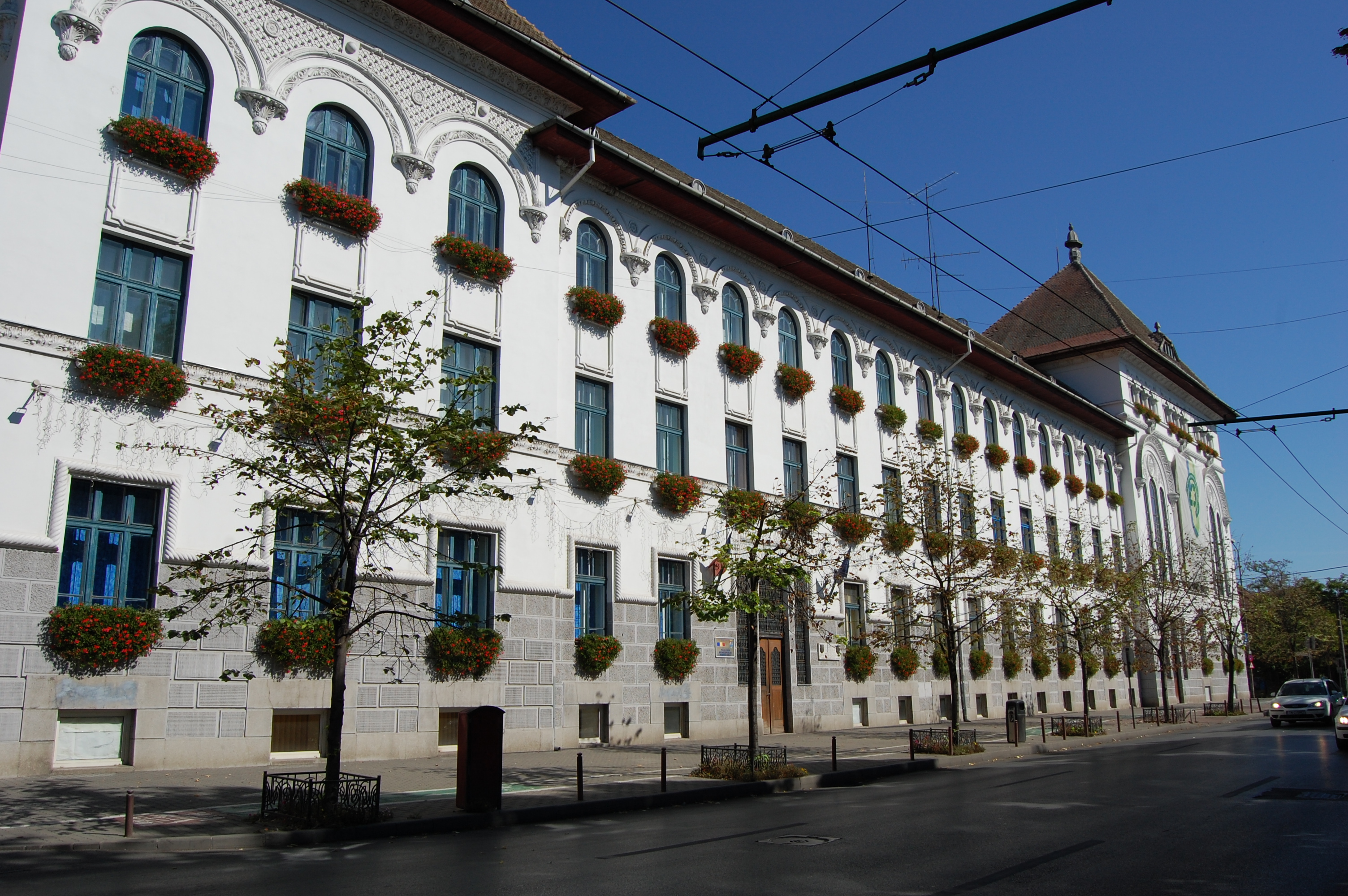 Primaria Timisoara